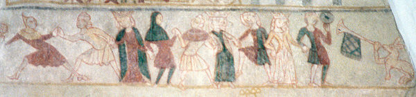 Kalkmaleri i Ørslev kirke ved Skelskør i Slagelse Kommune, Danmark. Kalkmaleriet selv med antages at være gammelt (mindst 70 år) og er således ikke beskyttet af ophavsret. Se også Dansefrisen i Ørslev Kirke